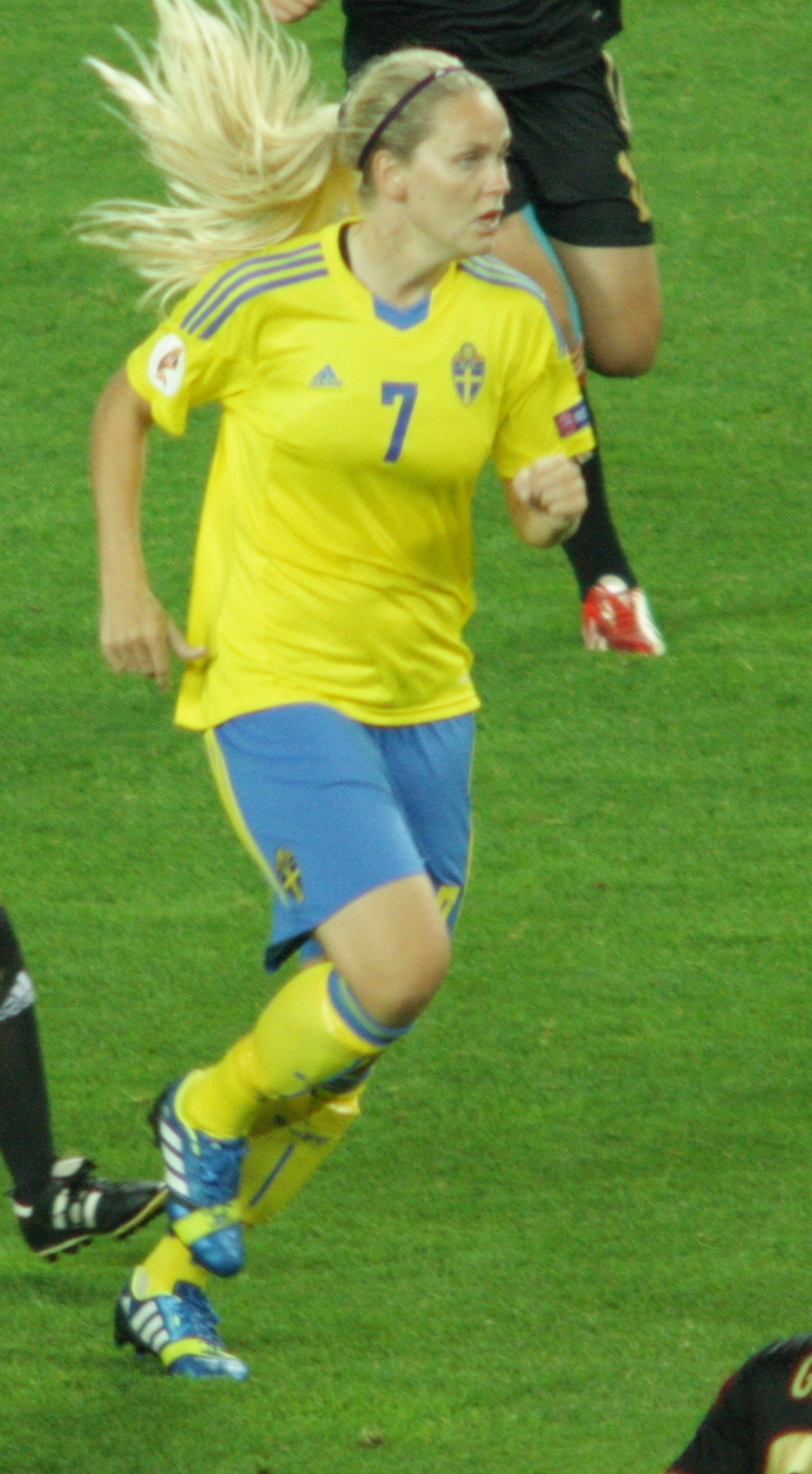 Lisa Dahlkvist